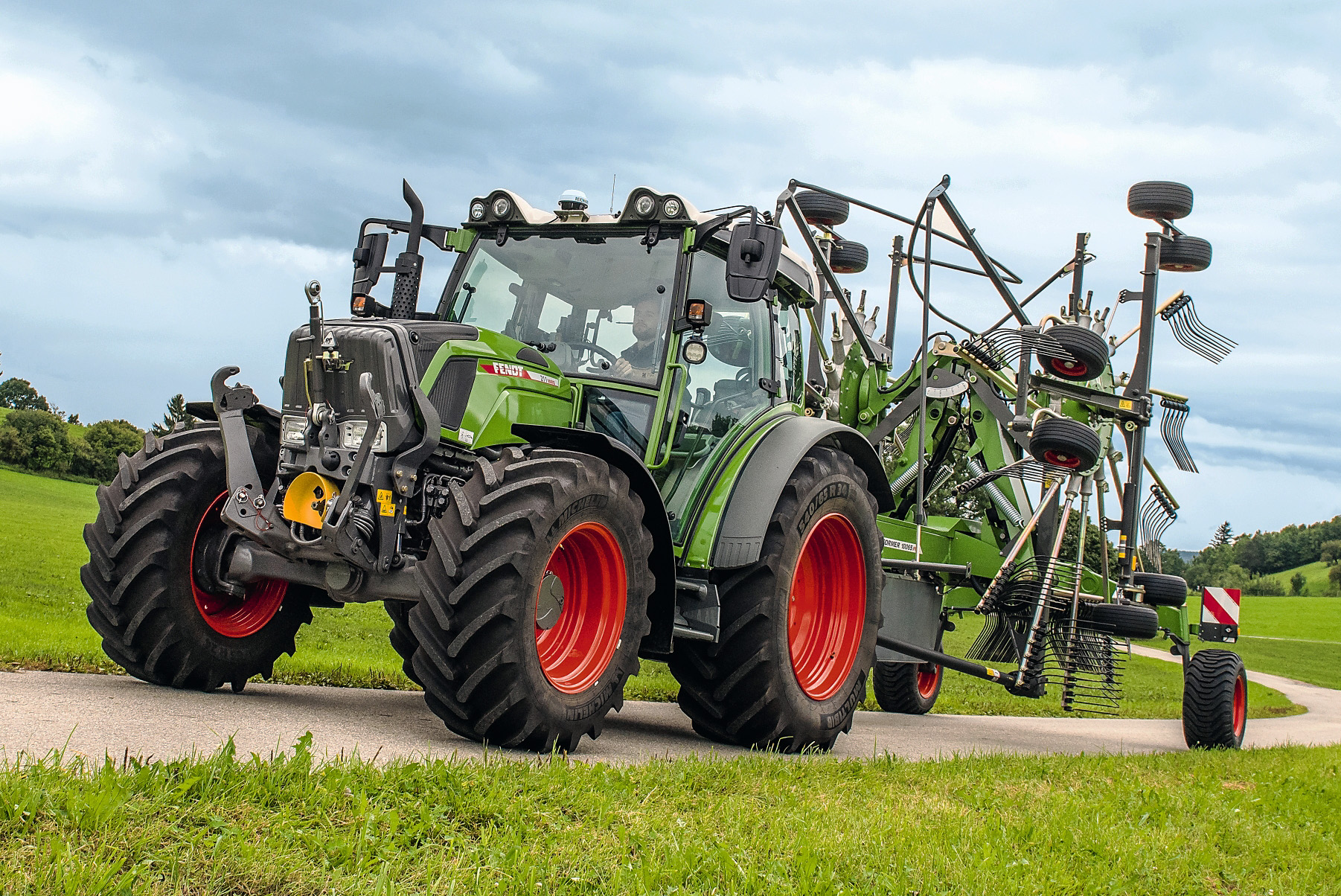 Fendt 211 Vario mit einem Fendt Former